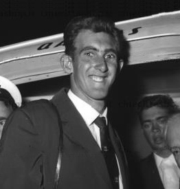 John Monkton nuotatore australiano ripreso mentre esce da un aereo della Qantas all'aeroporto di Ciampino